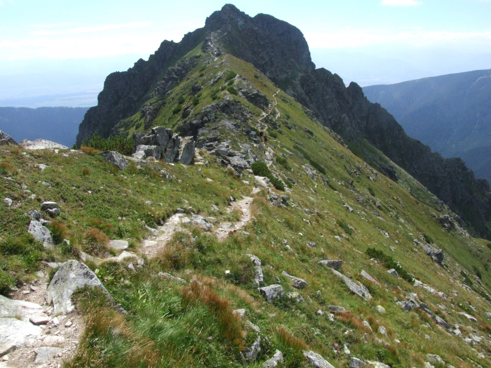 Otargańce (Tatry Zachodnie). Pośrednia Magura